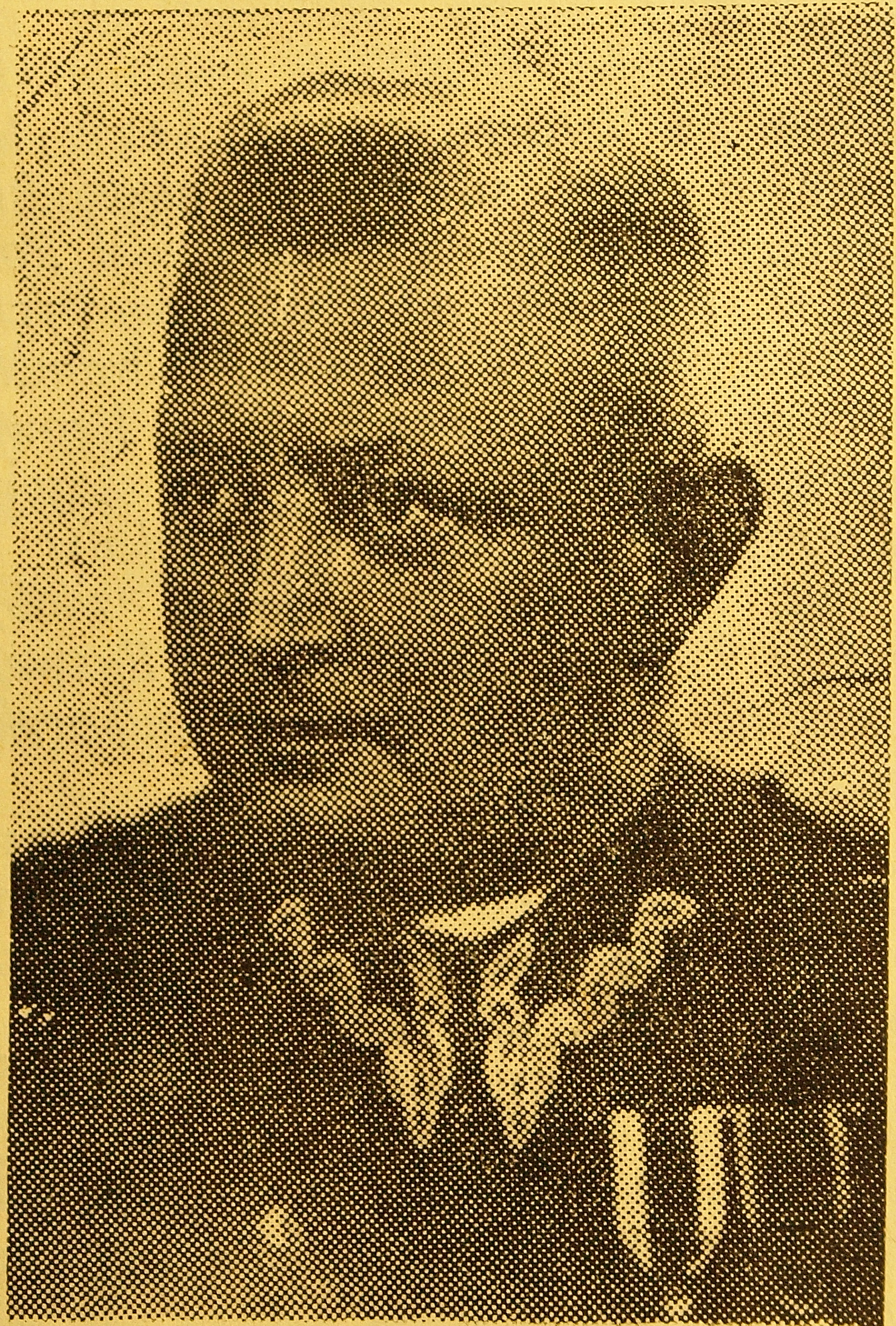 Wilhelm Blacha - prezes KS Ruch Chorzów